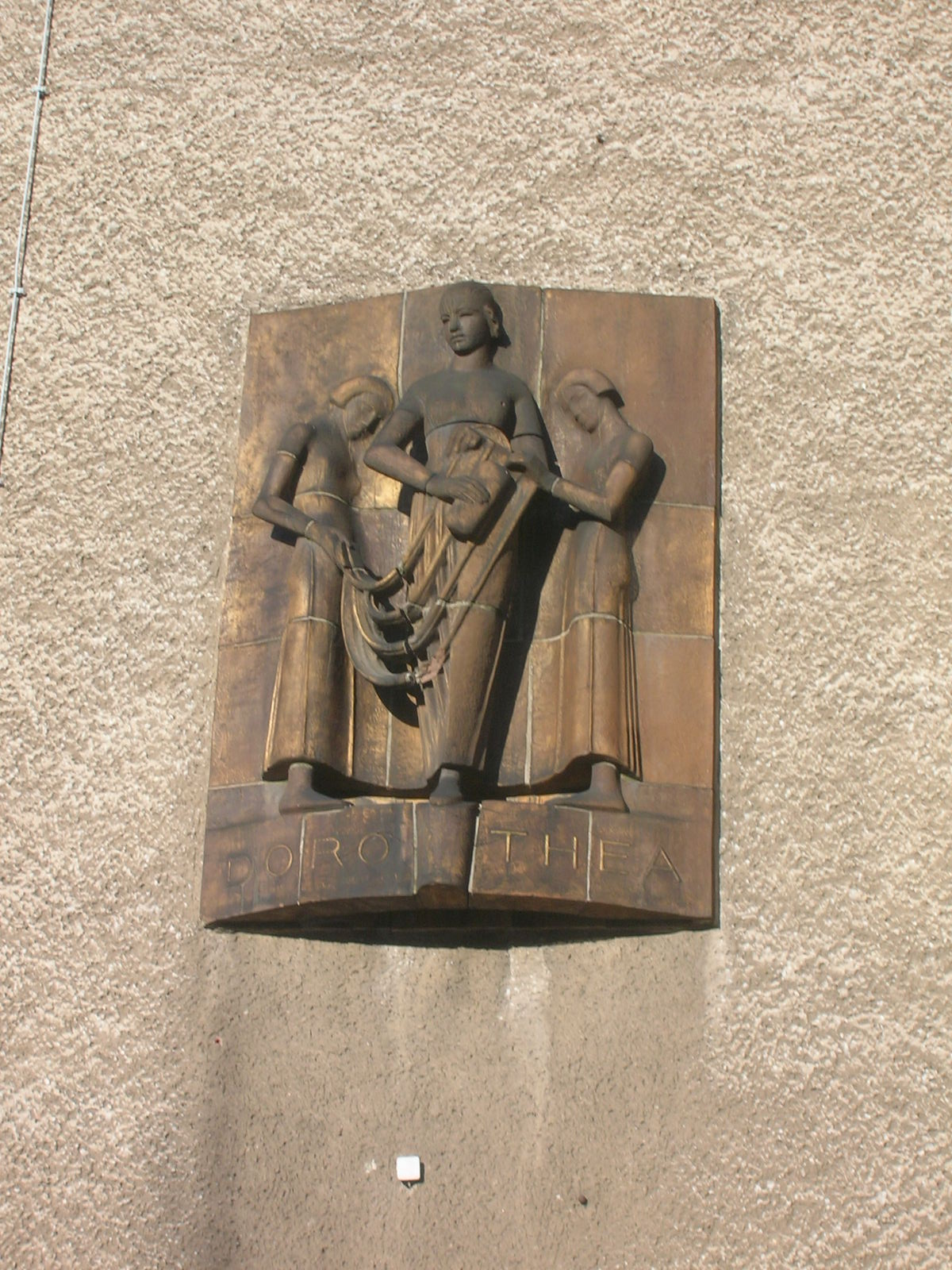 Berlin-Köpenick, Alexander-von-Humboldt-Oberschule, Keramikrelief der Heiligen Dorothea von Rudolf Belling am Eingangsportal (an Anlehnung an den früheren Namen Dorotheenschule) taken by Mazbln on January 22, 2006